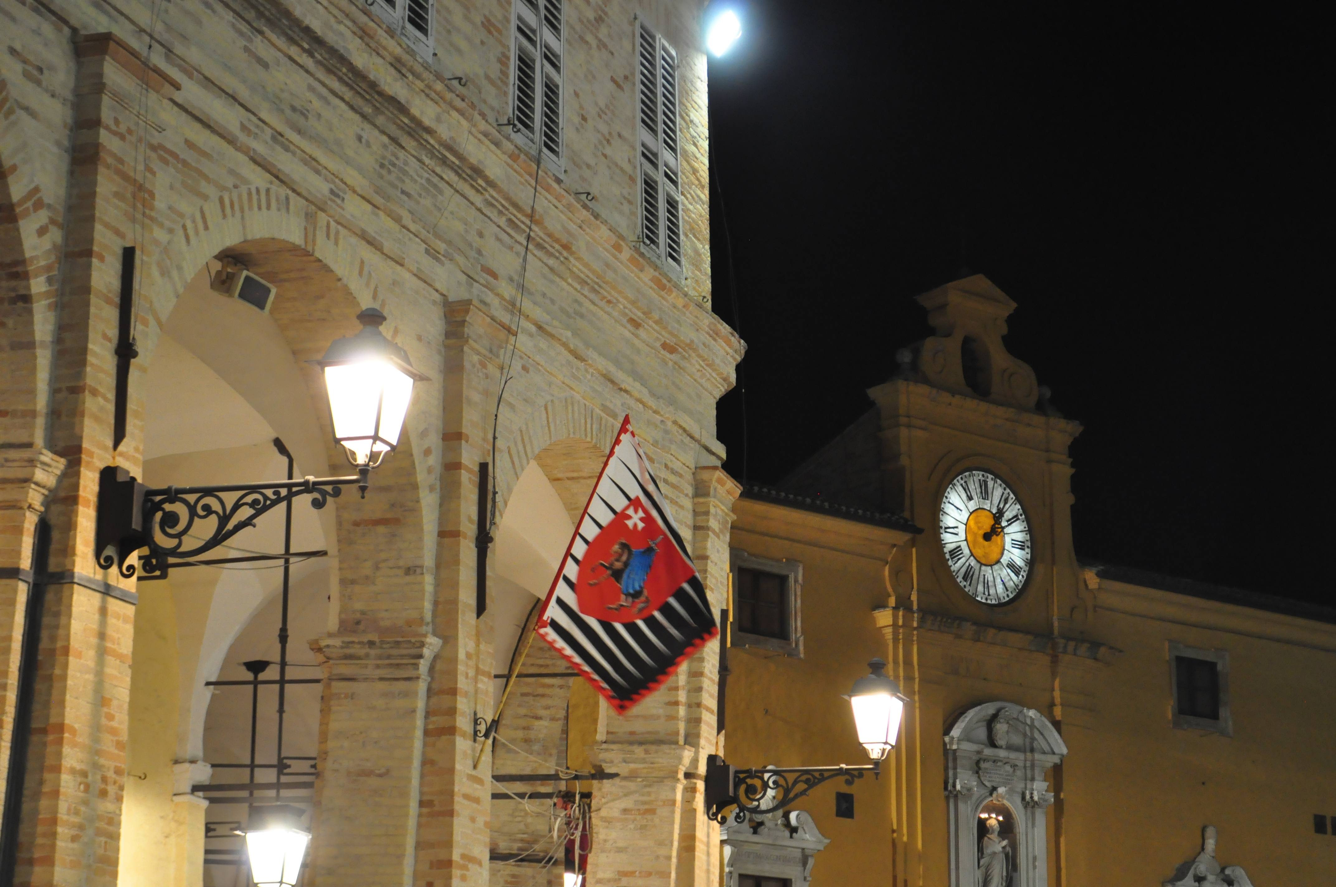 Piazza del Popolo, bandiera della Contrada San Martino